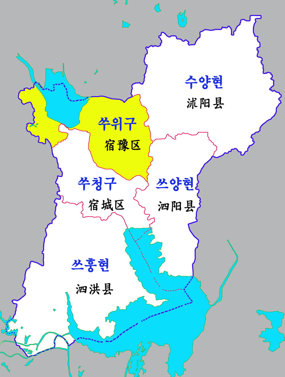 쑤첸시 현급구역